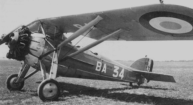 Le Morane-Saulnier M.S.230 à terre